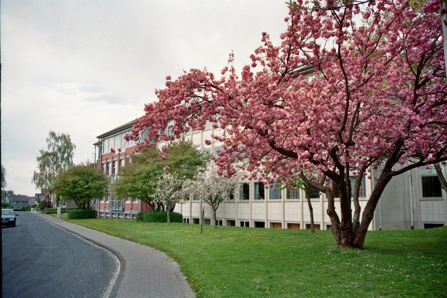 Städtisches Marien-Gymnasium Werl, Am Breilsgraben in Werl, Nordrhein-Westfalen, Deutschland.